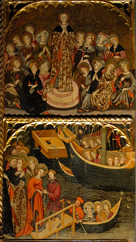 Compartiments del Retaule de Santa Úrsula. Església de Sant Miquel de Cardona. Cardona, Bages (Catalunya, Espanya)